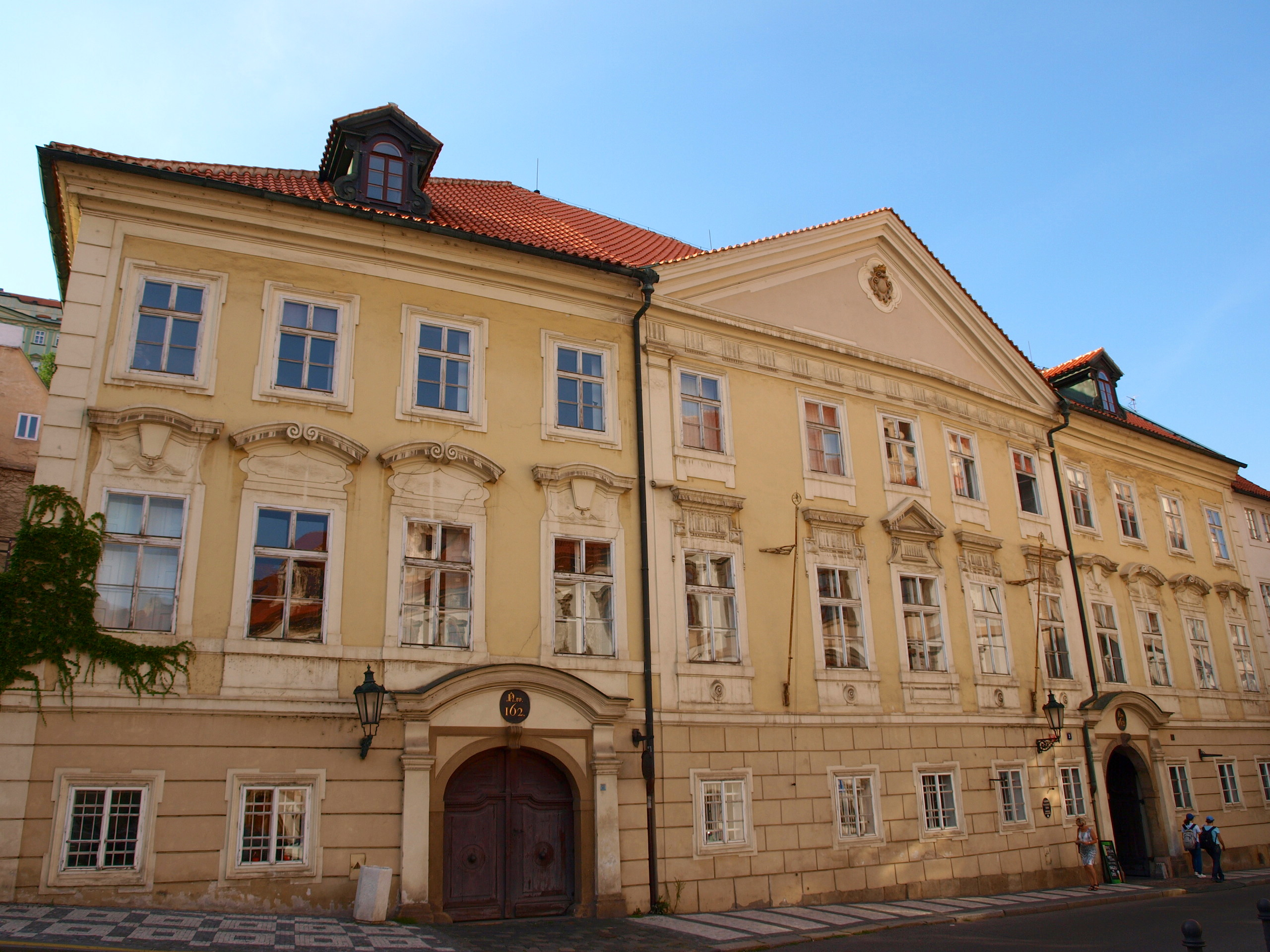 Ledebourský palác v Praze